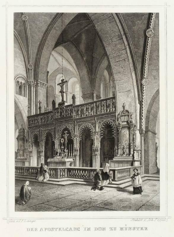 Stahlstich, 1852. Von Johann Poppel, nach J.[ohann] F.[riedrich] Lange. 14,5 x 10,6 cm (Darstellung / ohne Schmuckrahmen) / 22,5 x 14,5 cm (Blatt). Aus: Original-Ansichten der historisch merkwürdigsten Städte in Deutschland (Darmstadt: Gustav Georg Lange 1852), Bd. 10.